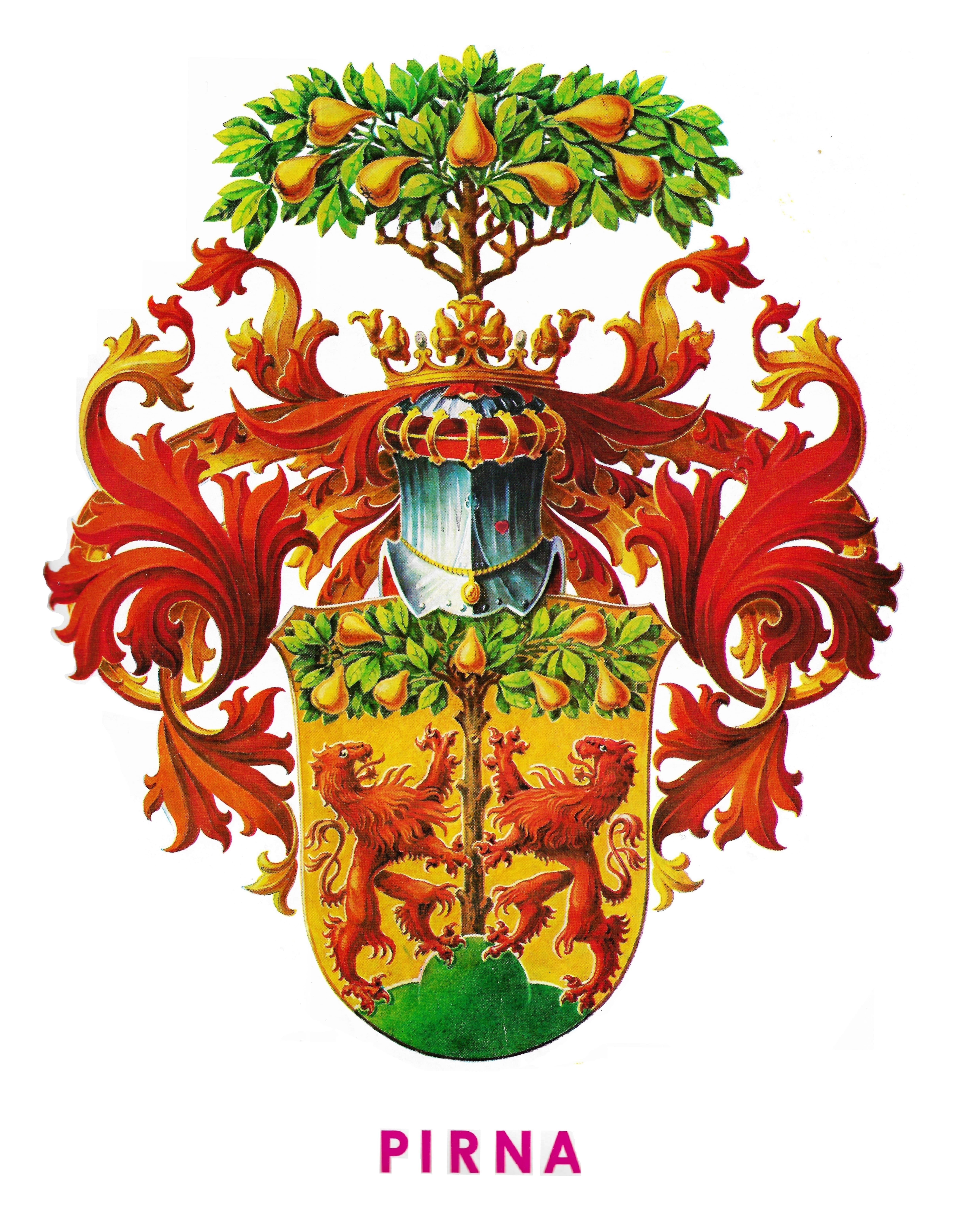 Escudo escanear. Fue publicado en todas las instalaciones. También había sido utilizado por los ciudadanos.Lo especial es que aquí la imagen fue dibujada con lápices de colores en un tamaño original de 1m aprox. Luego fue reproducido. Usaste una cámara repro y luego la duplicaste. Probablemente con impresoras de fotocopias? Proceso de serigrafía fina? Escáneres de tambor?